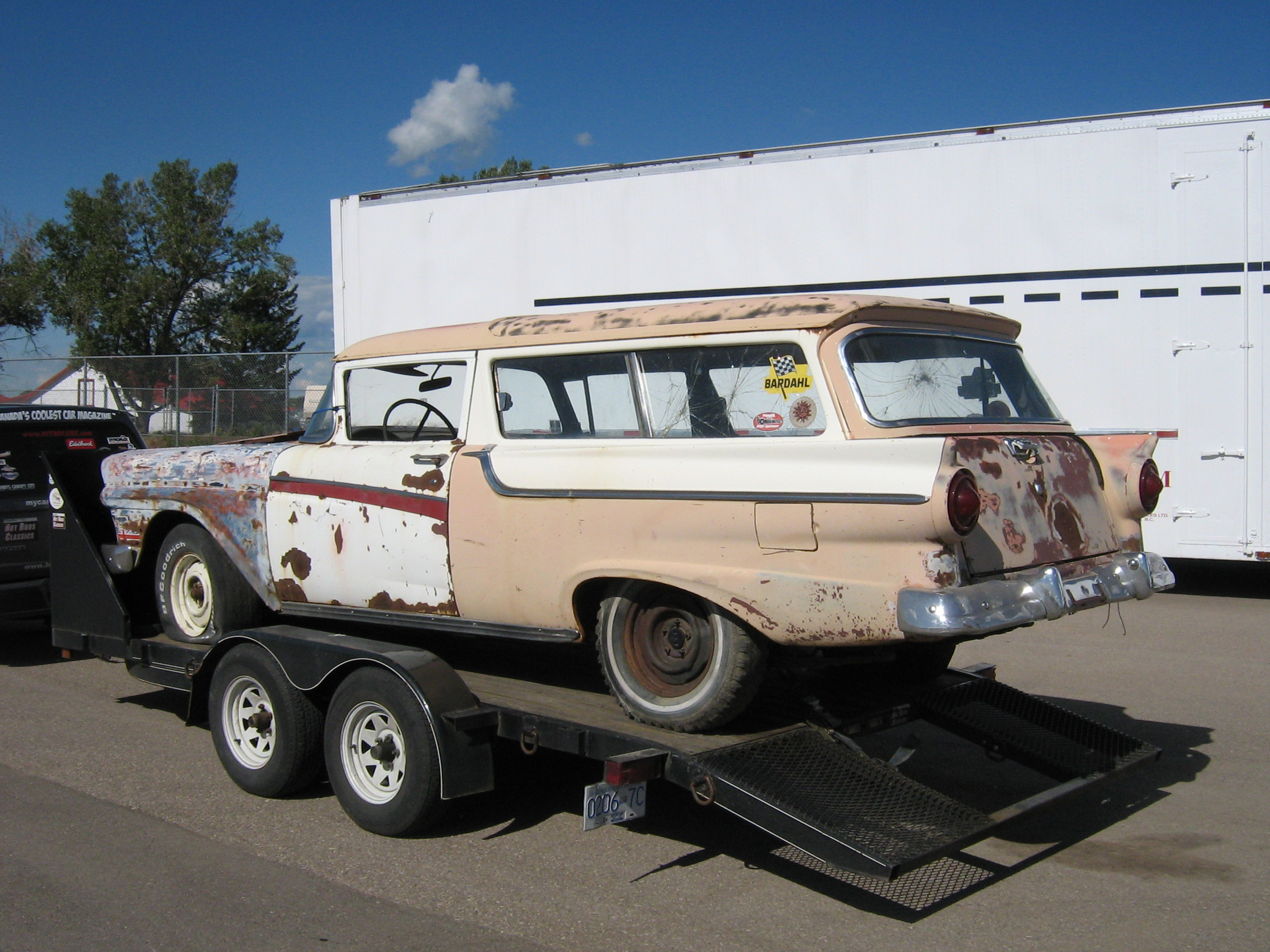 Ford project wagon